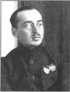 Сергей Ильич Байло(1892—1937) — военный деятель периода гражданской войны